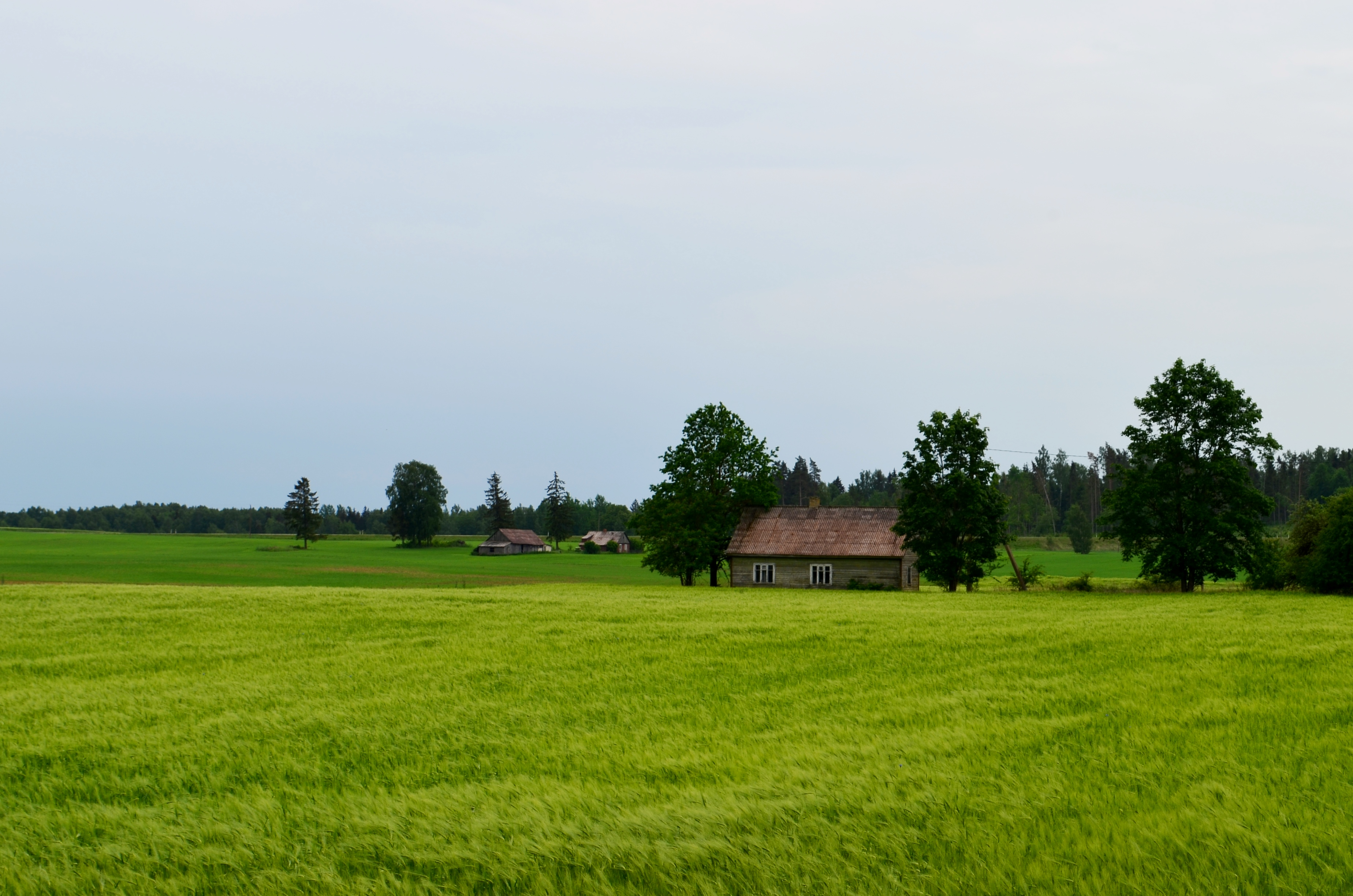 Burbiškiai, Raseinių r.